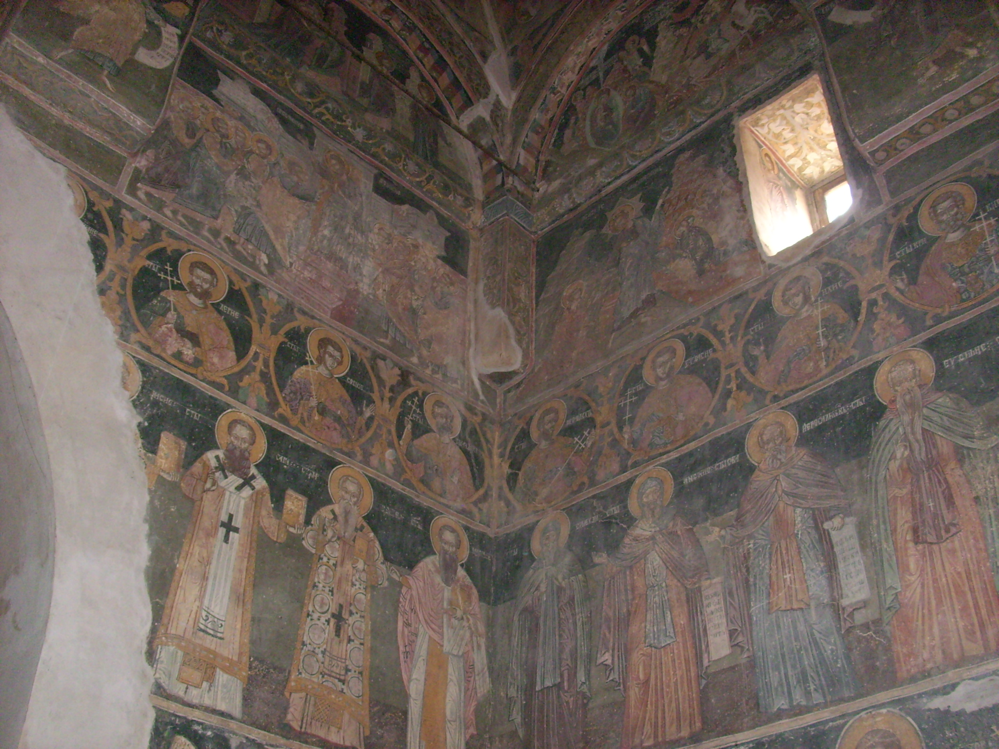 Манастир Ново Хопово се налази на падини јужних обронака Фрушке горе, недалеко од Ирига.